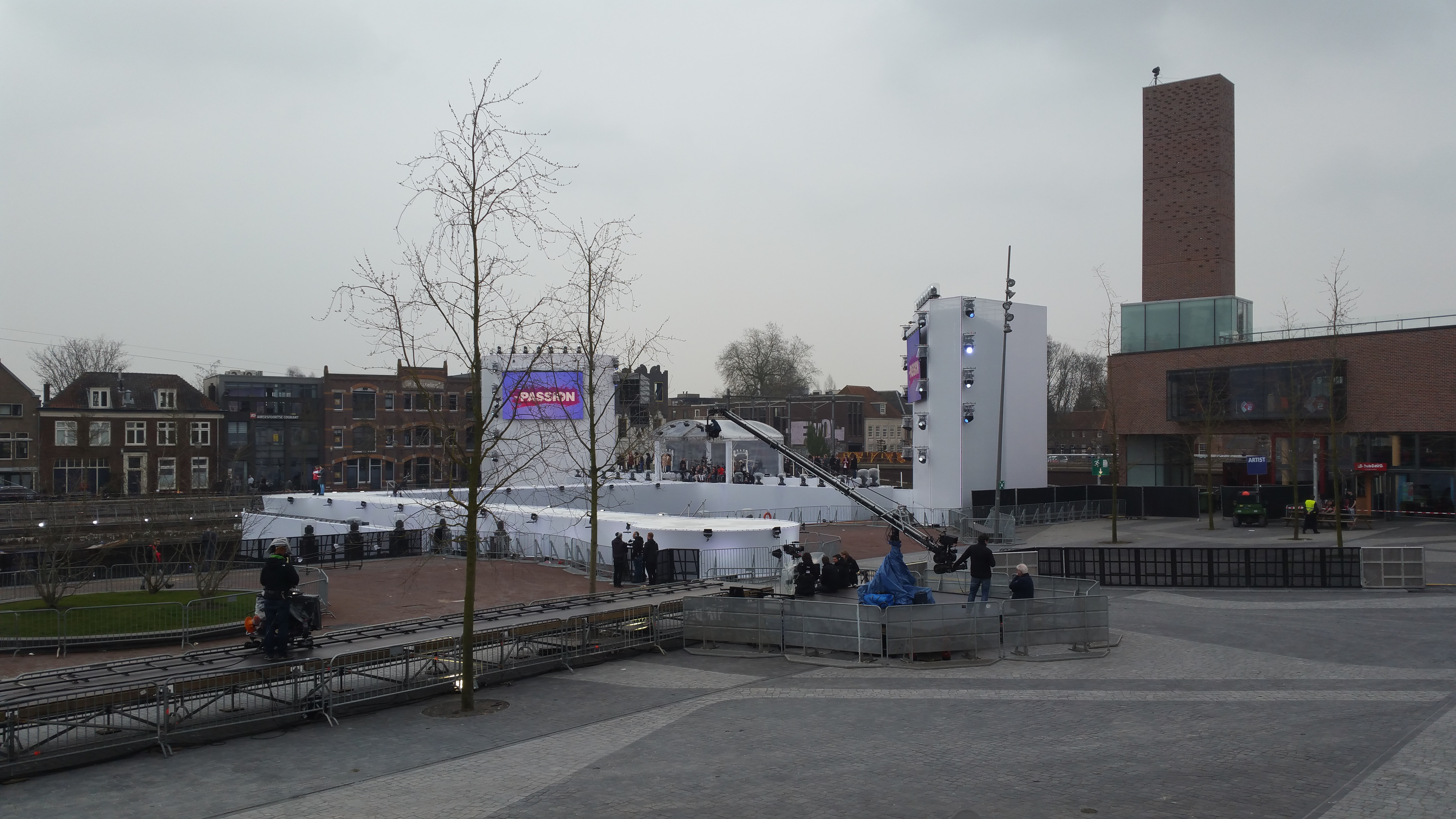 hoofdpodium van The Passion 2016 op het Eemplein in Amersfoort